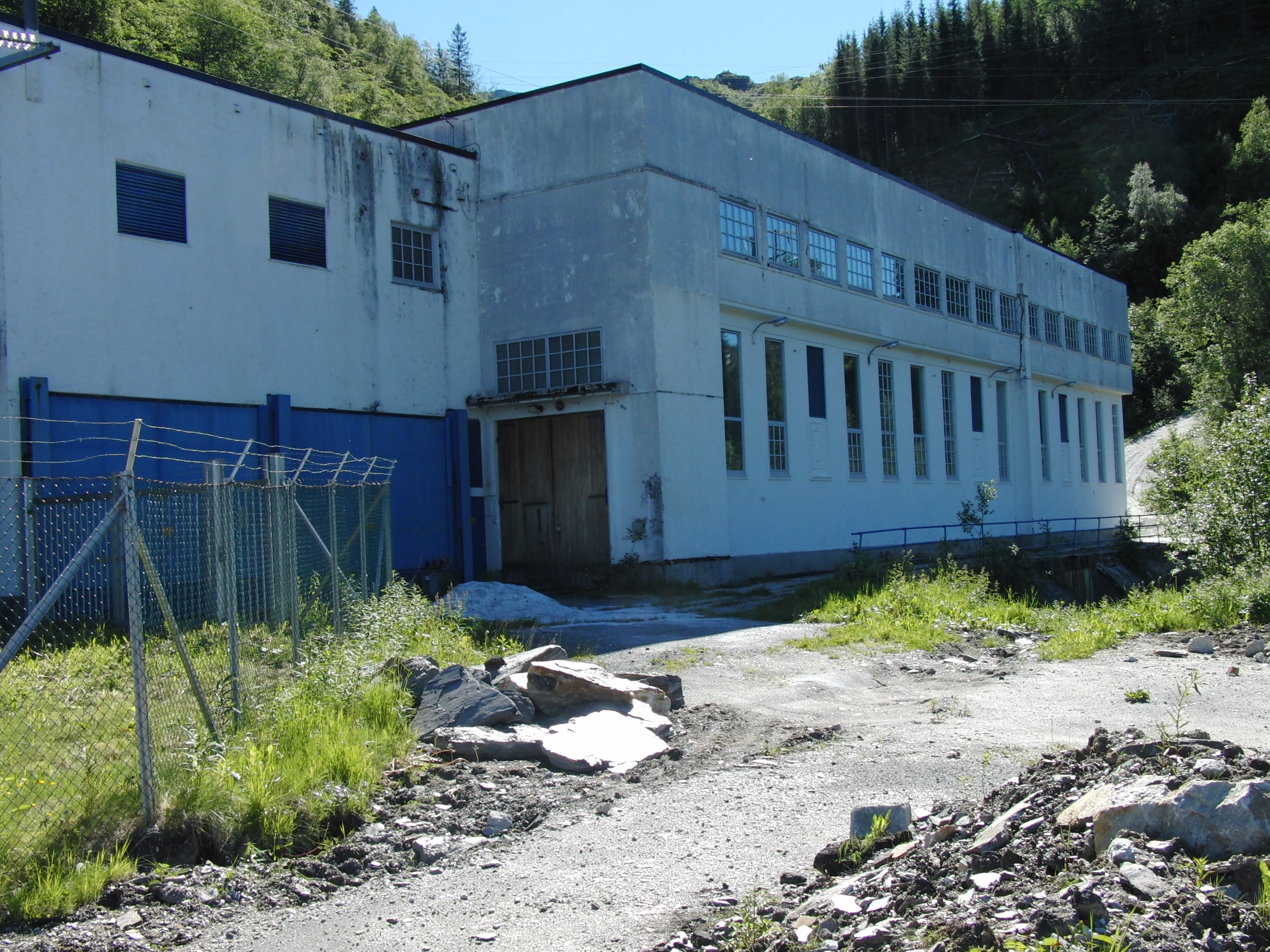 Langfjord gamle kraftverk